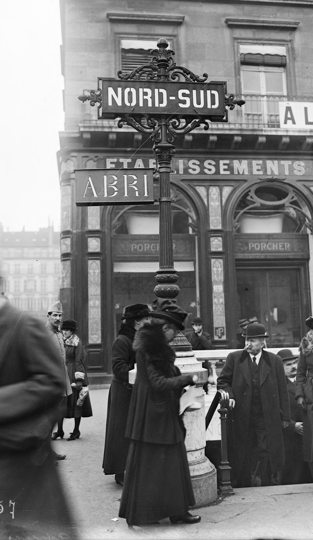 Mât de la Société du chemin de fer électrique souterrain Nord-Sud de Paris. En arrière-plan les établissements Porcher.